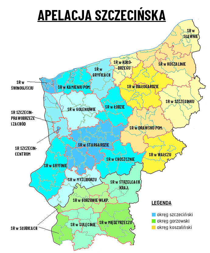 Obszar właściwości Sądu Apelacyjnego w Szczecinie z uwzględnieniem okręgów oraz rejonów.